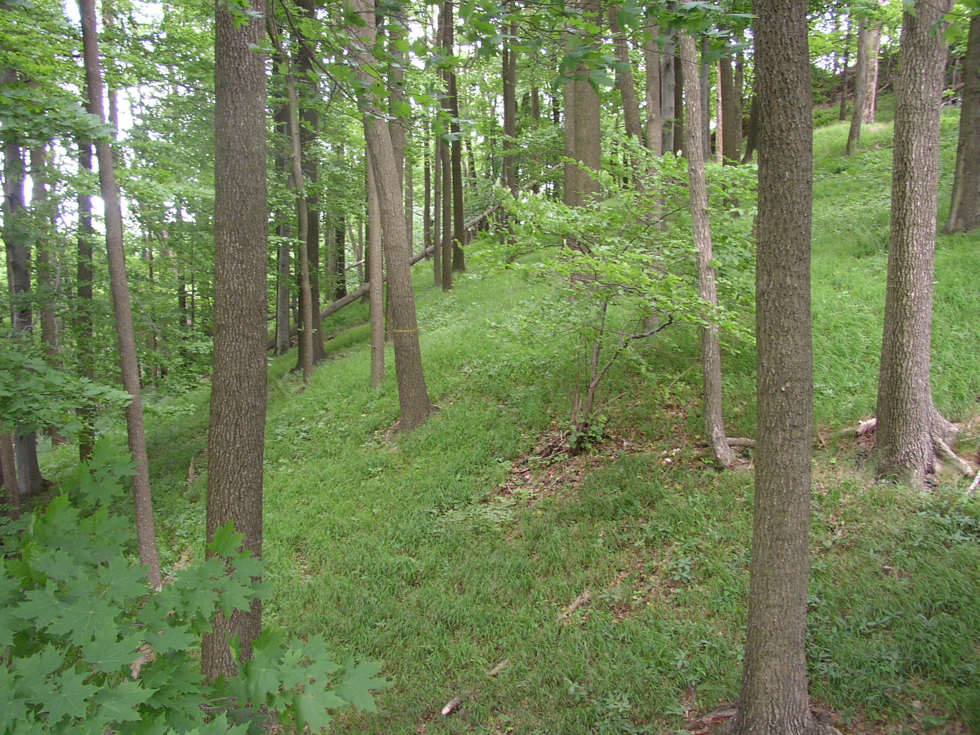 Světlomilný les na Spravednosti